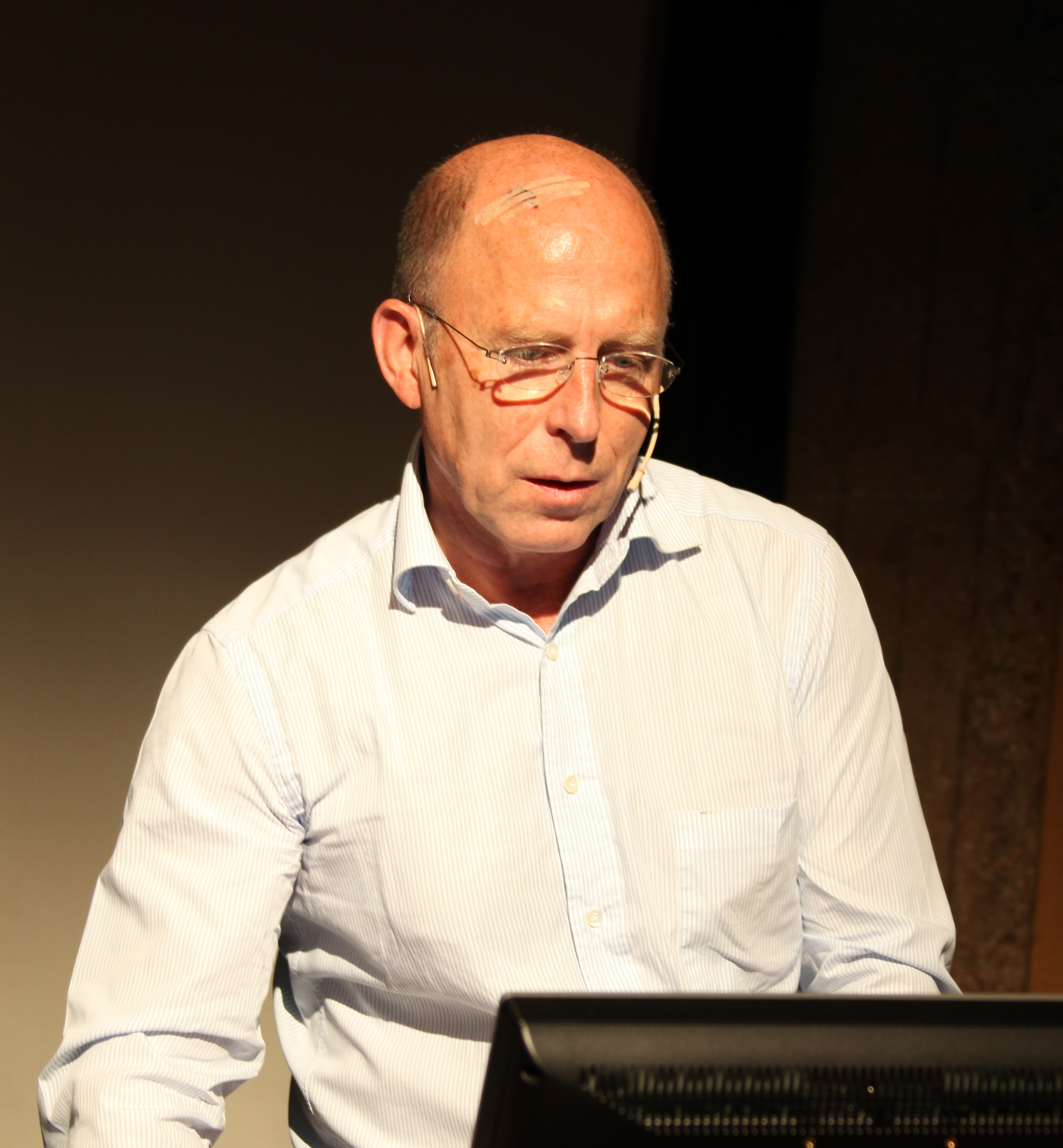 Wikipedia Academy, Olav Terje Bergo